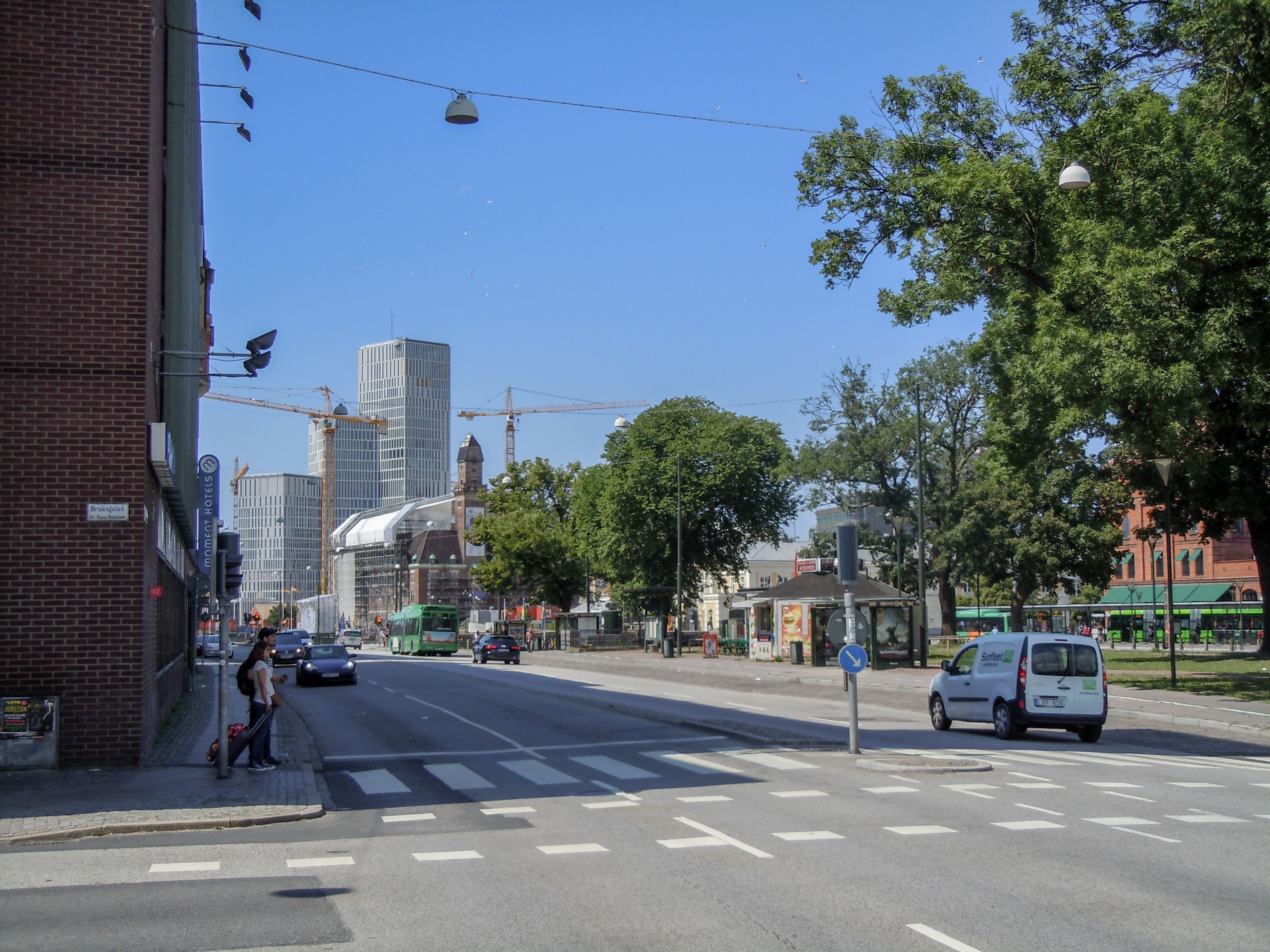 Norra Vallgatan, Malmö This is a contemporary depiction of the image at Malmö Norra Vallgatan 1943, foto: Fredrik Daniel Bruno. This image was uploaded as part of the competition (Then and Now). English | Svenska | +/− This is a contemporary depiction of the image at Malmö Norra Vallgatan återfotografering 2010 av första bilden, foto: Bengt A Lundberg. This image was uploaded as part of the competition (Then and Now). English | Svenska | +/−